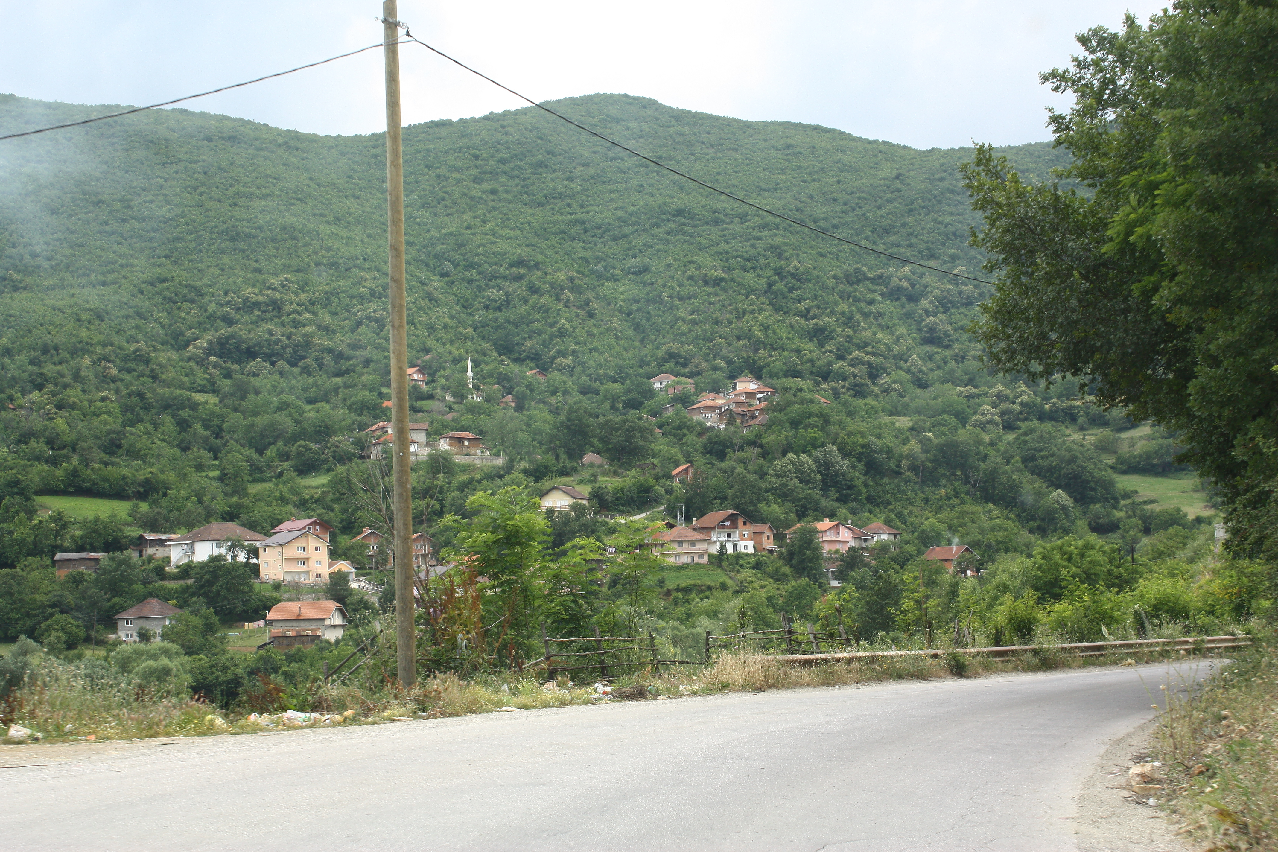 Otišani, Macedonia